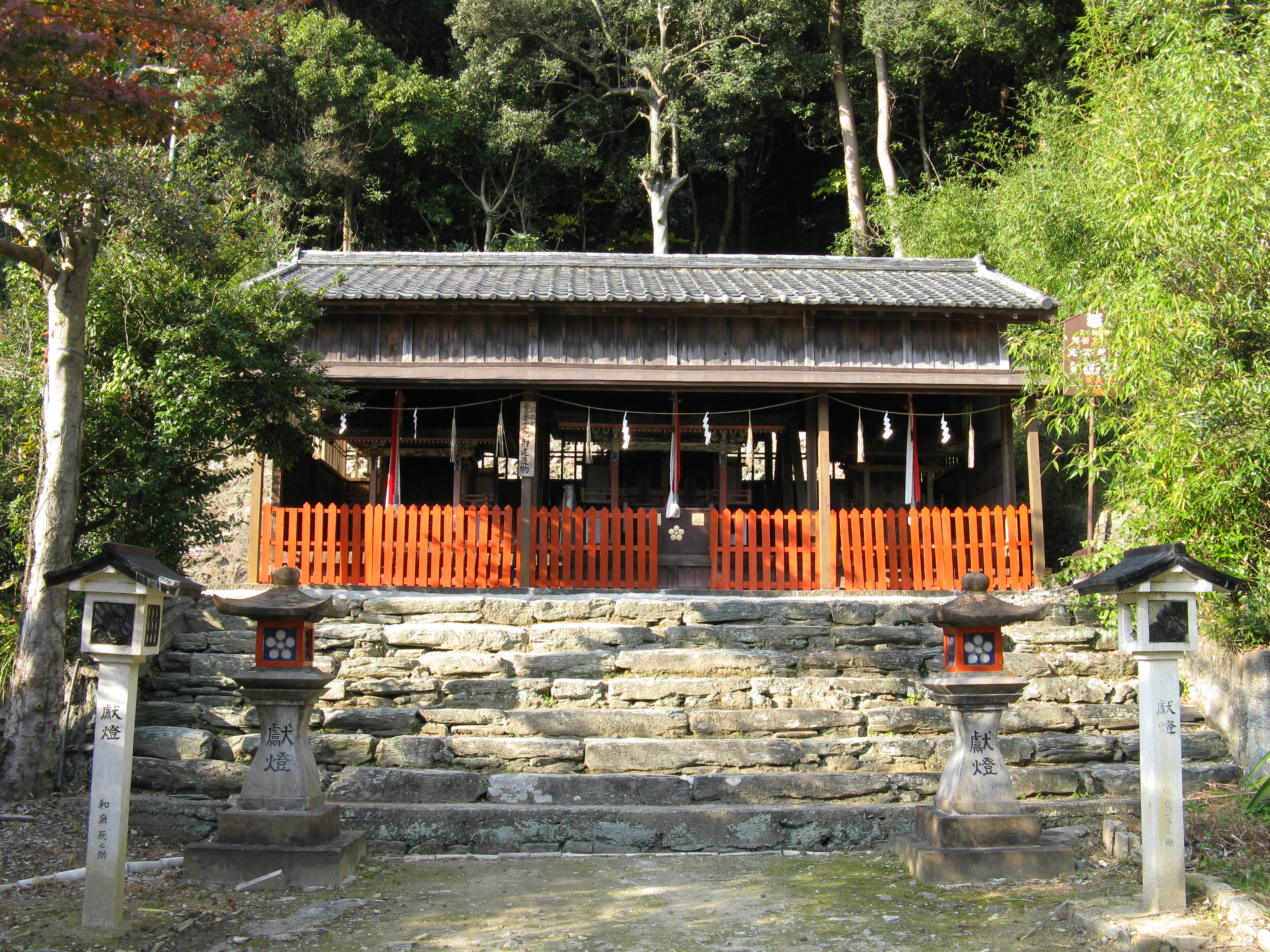 和歌浦天満宮 摂末社